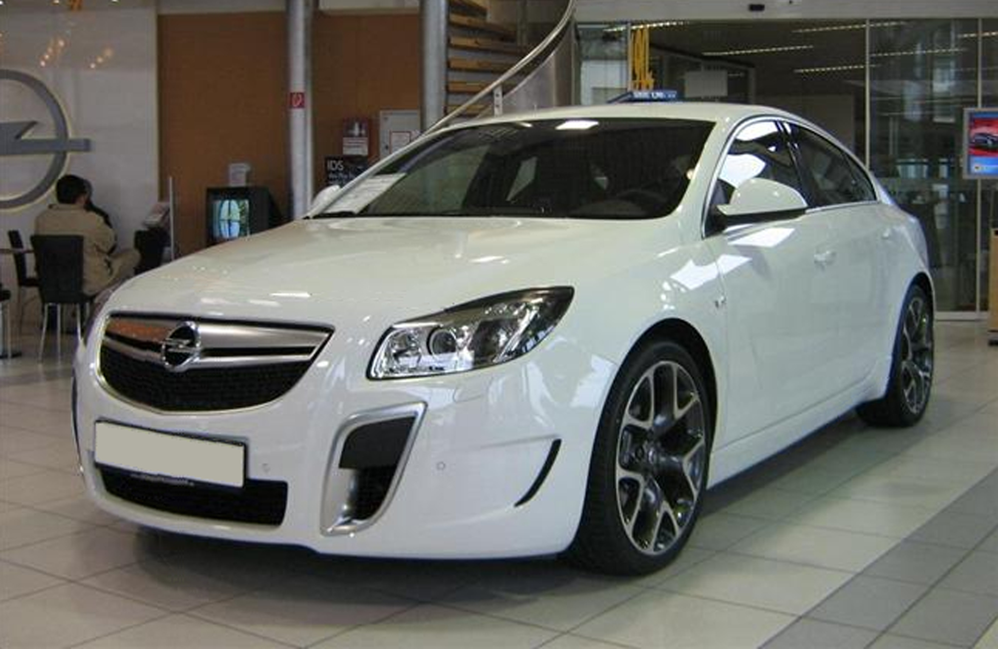 Insignia ST